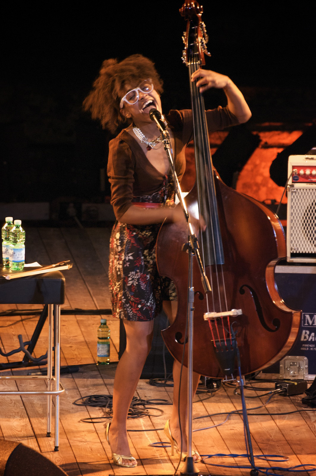 Esperanza Spalding - Concerto del 15 luglio 2009 a Fiesole - Firenze